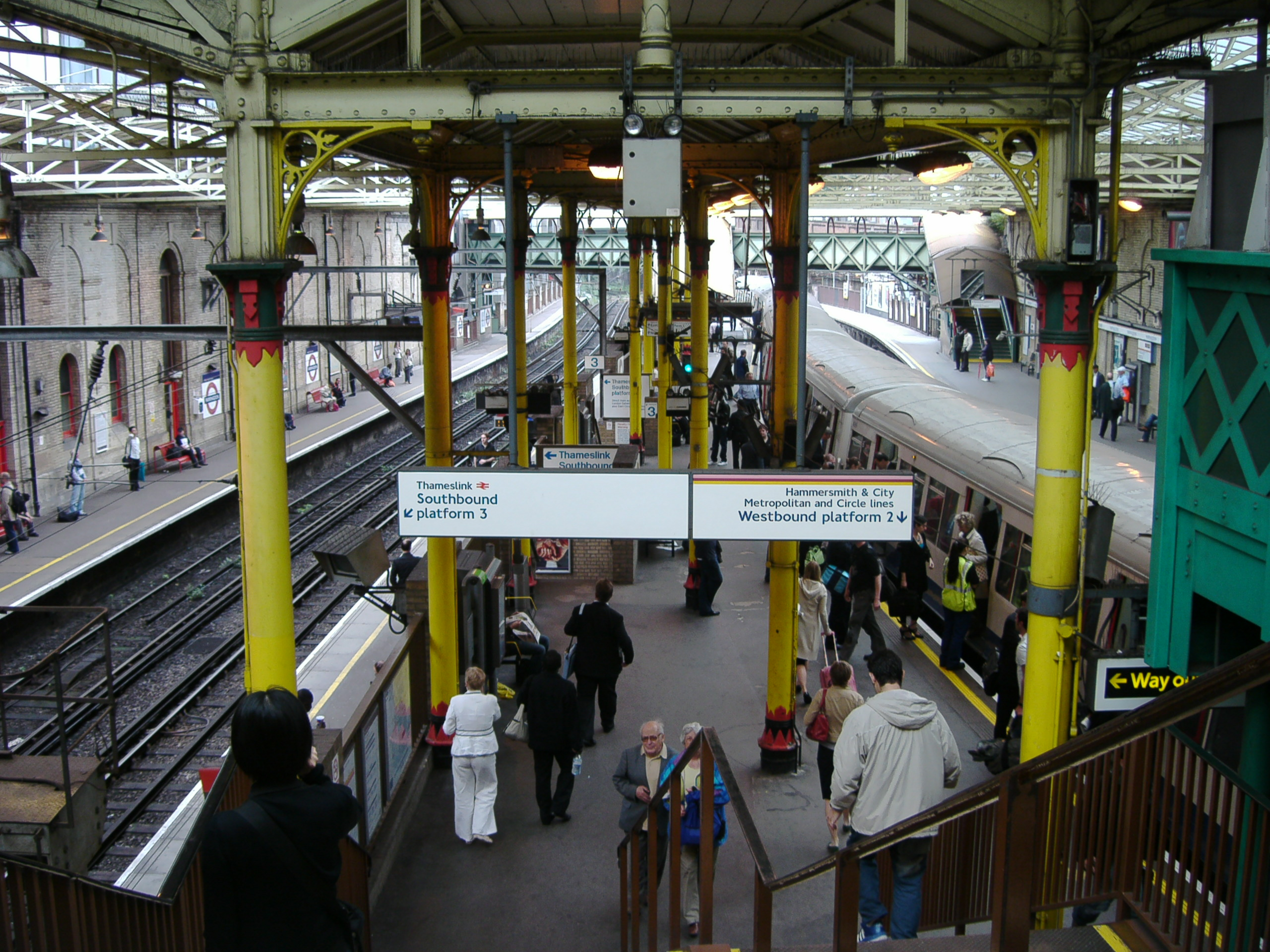 Bahnhof Farringdon, Blickrichtung Nordwest, links die Thameslink-Gleise (2 Bahnstromsysteme!), rechts die U-Bahn-Gleise